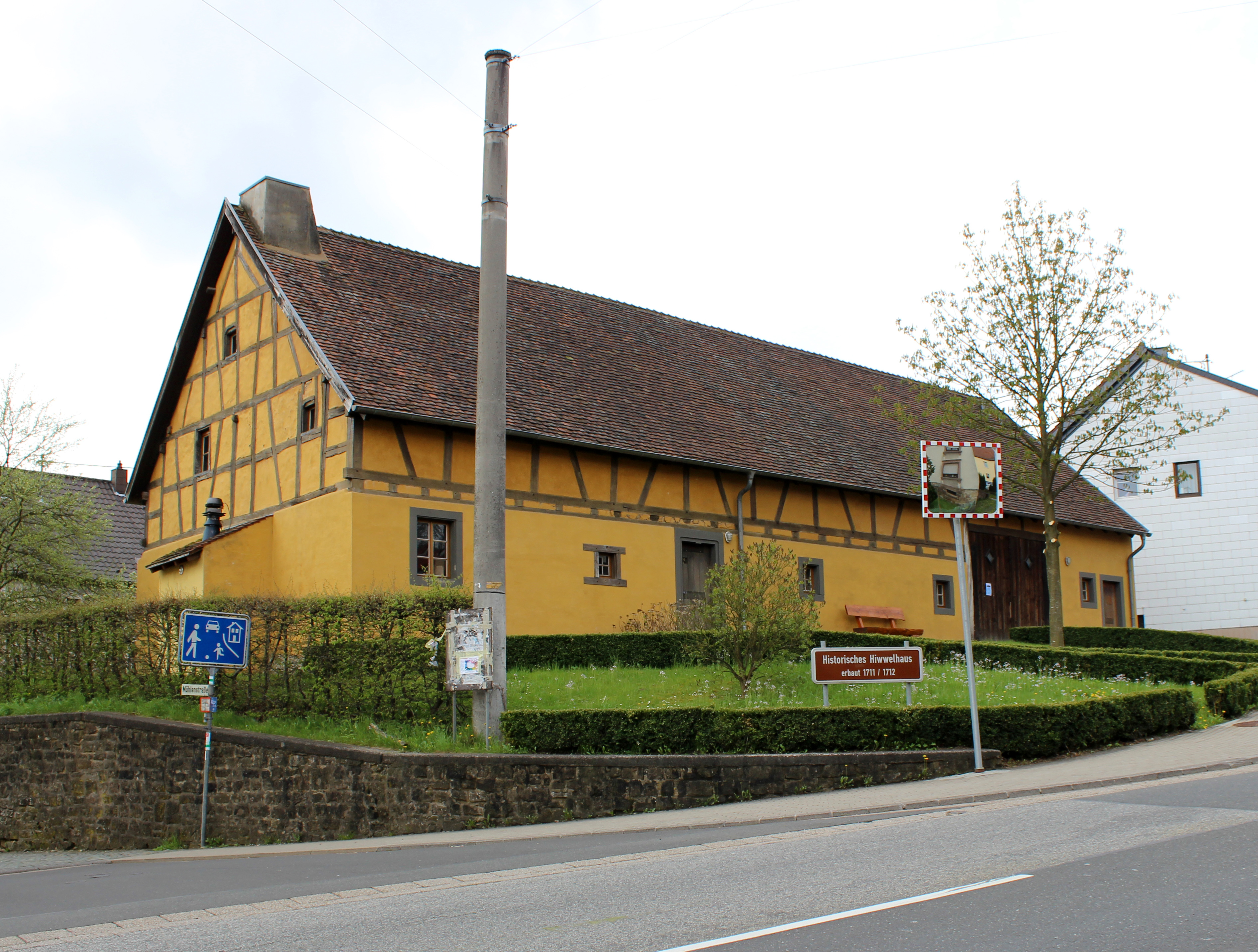 Das Hiwwelhaus (Haus auf dem Hügel) in Alsweiler, einem Ortsteil der Gemeinde Marpingen, Landkreis St. Wendel. Das aus dem Jahr 1712 stammende Gebäude gilt als ältestes im Originalzustand erhaltene Bauernhaus des Saarlandes.